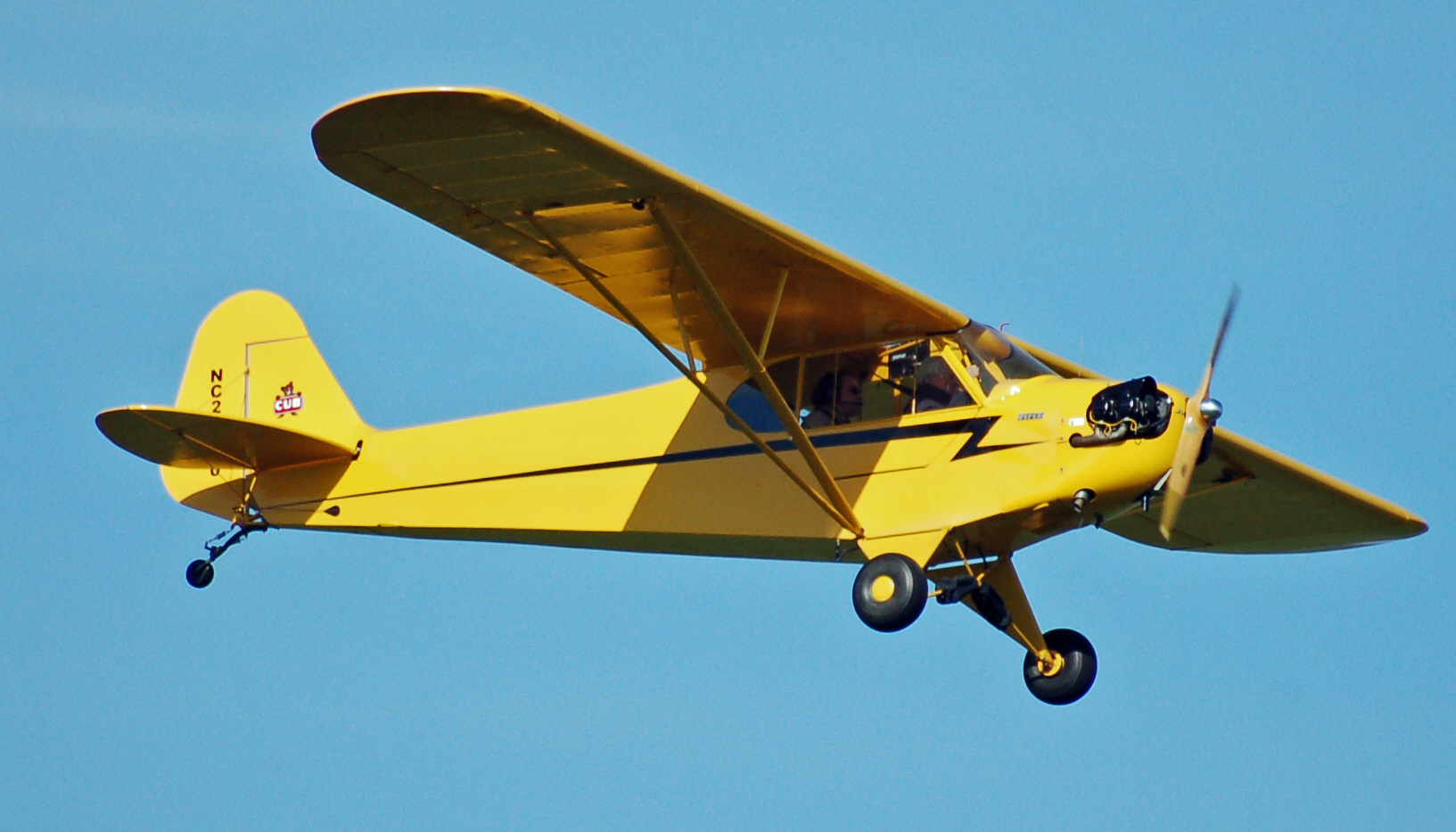 Gelbe Piper PA-18 Super Cub über dem Flugplatz Uetersen